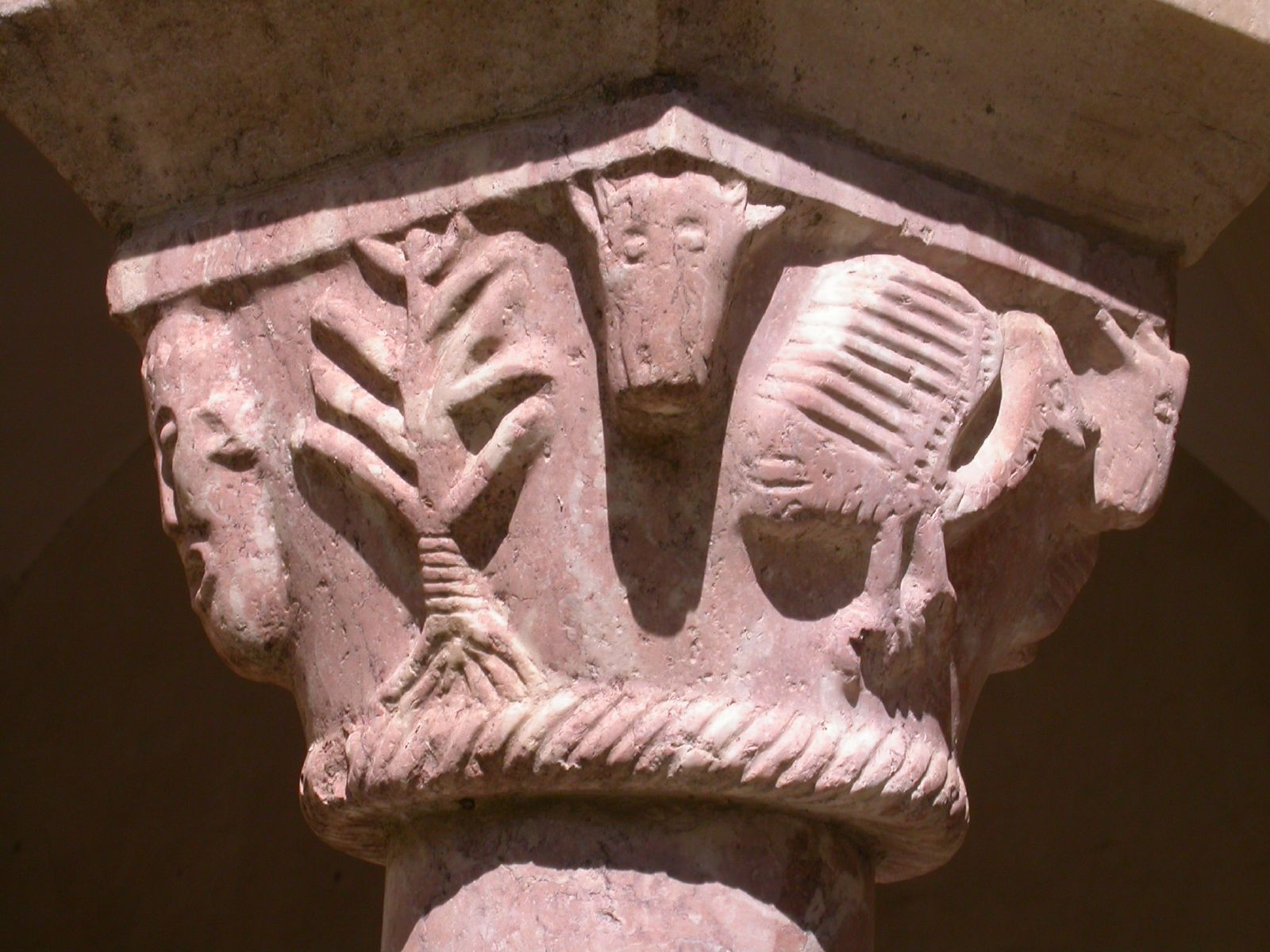 Sant Genís de Fontanes, Rosselló, claustre finals del XIII